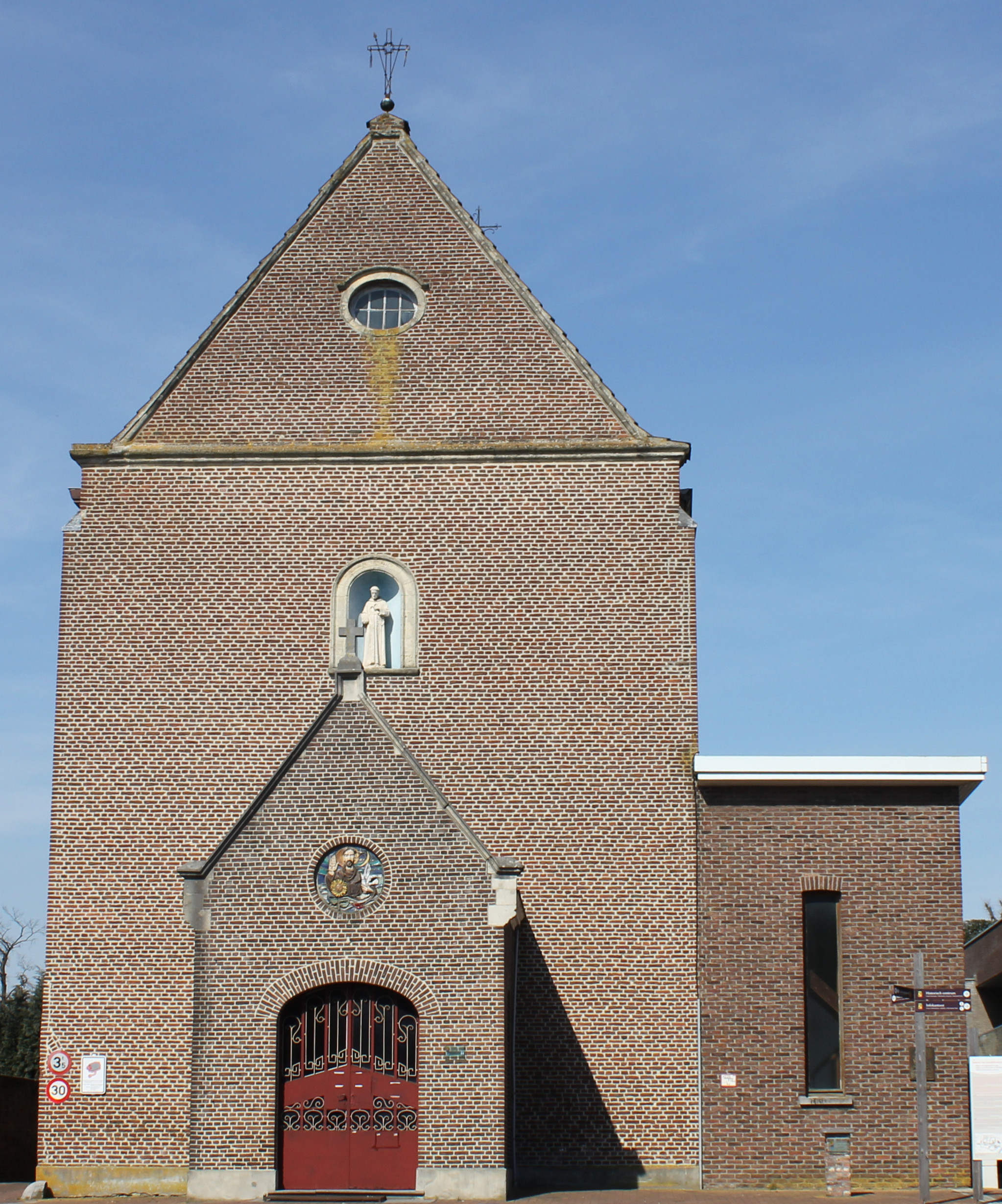 Kloosterkerk van het voormalige Minderbroedersklooster te Rekem